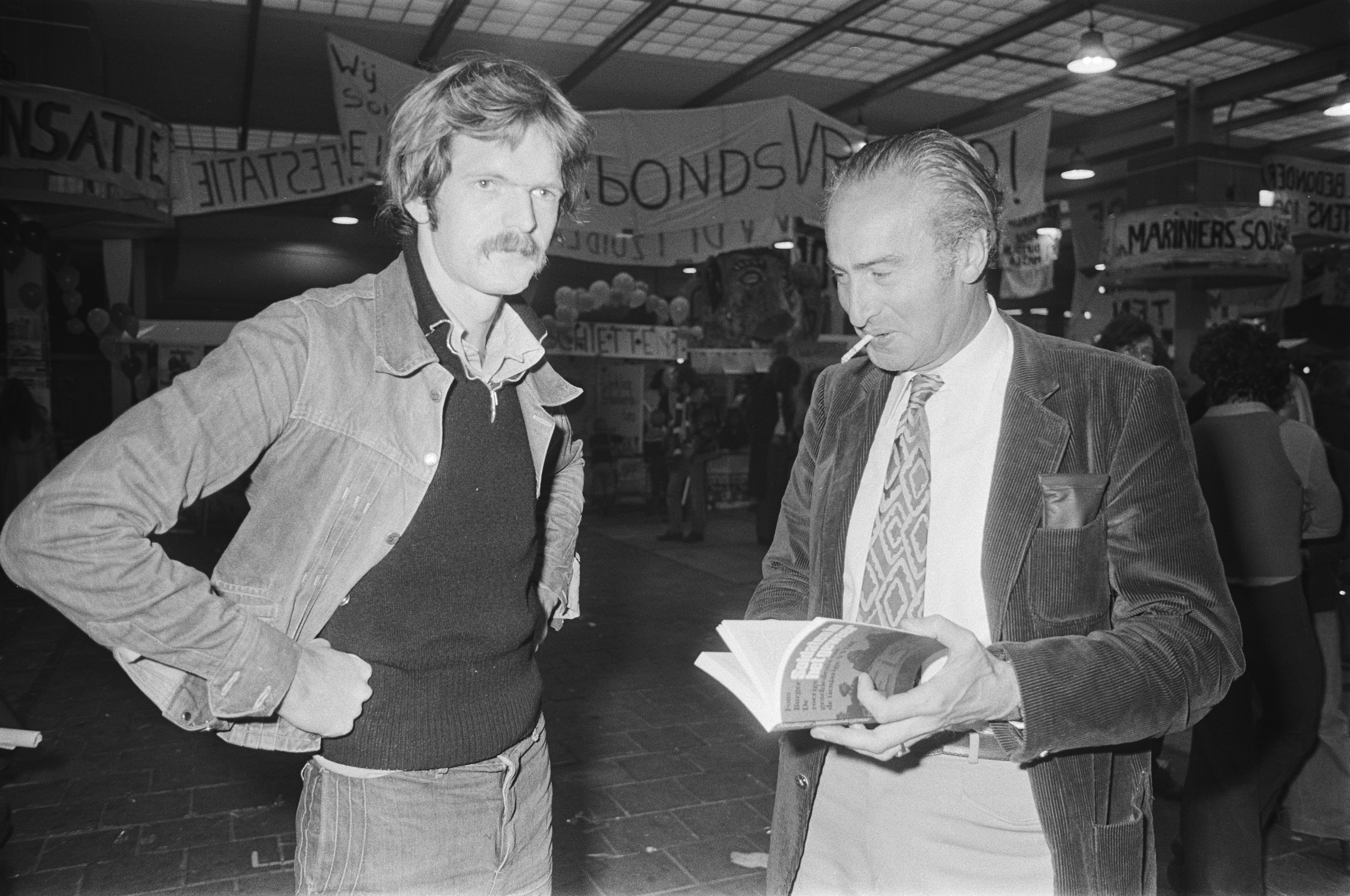 Collectie / Archief : Fotocollectie Anefo Reportage / Serie : [ onbekend ] Beschrijving : VVDM viert tien-jarig jubileum in Utrecht,Minister Vredeling krijgt boek van Fons Burger (links) Datum : 11 september 1976 Locatie : Utrecht Trefwoorden : boeken, jubilea Persoonsnaam : Vredeling, Henk Instellingsnaam : VVDM Fotograaf : Croes, Rob C. / Anefo Auteursrechthebbende : Nationaal Archief Materiaalsoort : Negatief (zwart/wit) Nummer archiefinventaris : bekijk toegang 2.24.01.05 Bestanddeelnummer : 928-7760